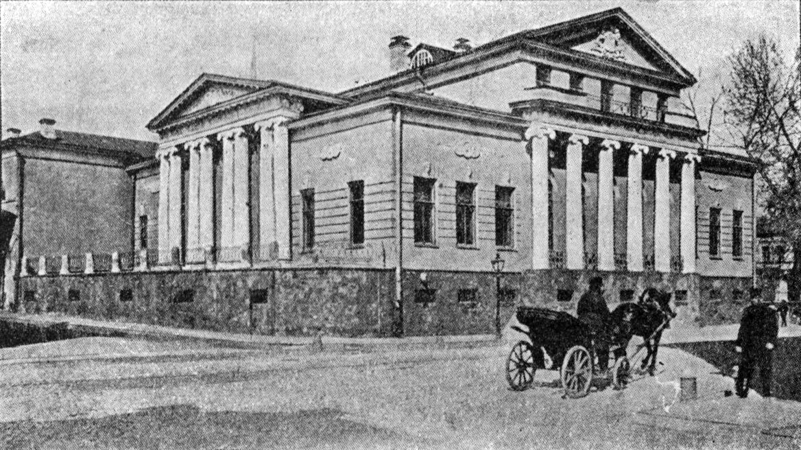 Дом, бывший Н. Д. Селезнёва, на Пречистенке, пожертвованный московскому дворянству в 1906 году